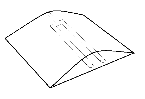 imbväljaku süsteem - küngas